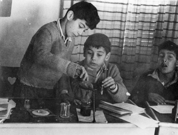 גן-שמואל - ילדי קב' אלומה בניסוי לימודי 1953.